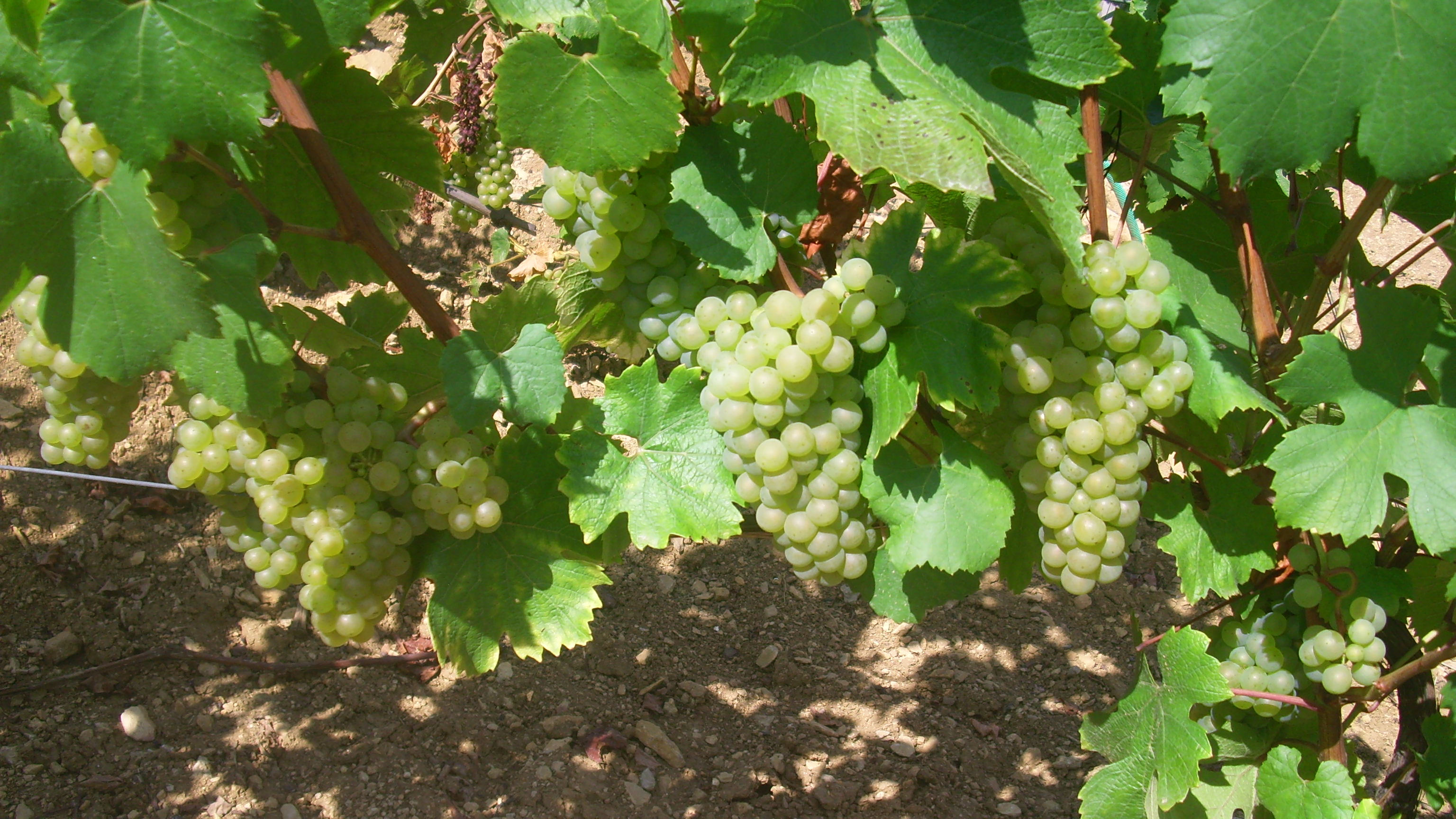 Grappes de Chardonnay à Montagny-lès-Buxy